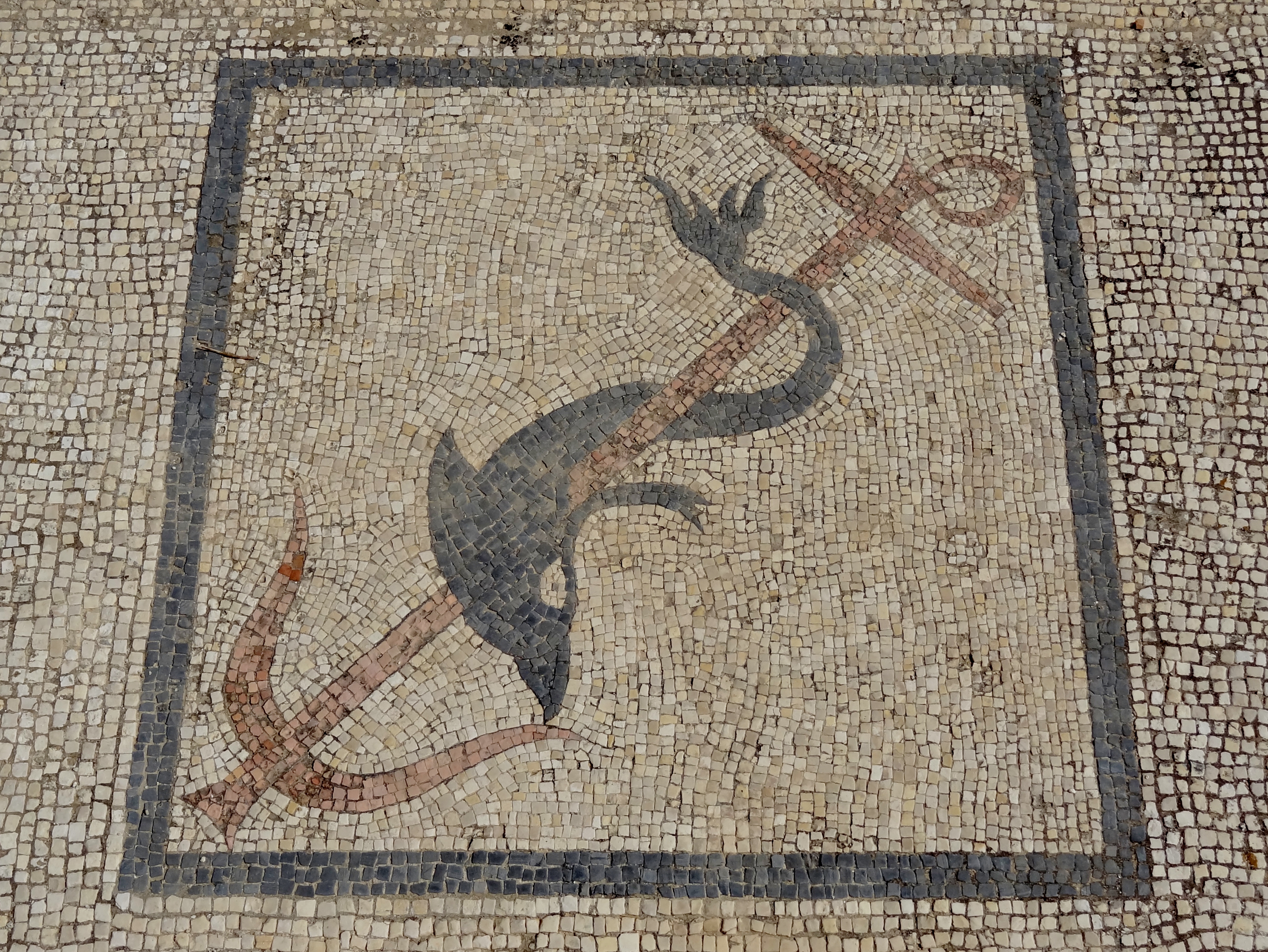 Mosaik im Hof des Hauses des Dreizacks im Theaterviertel auf Delos, Kykladen, Griechenland